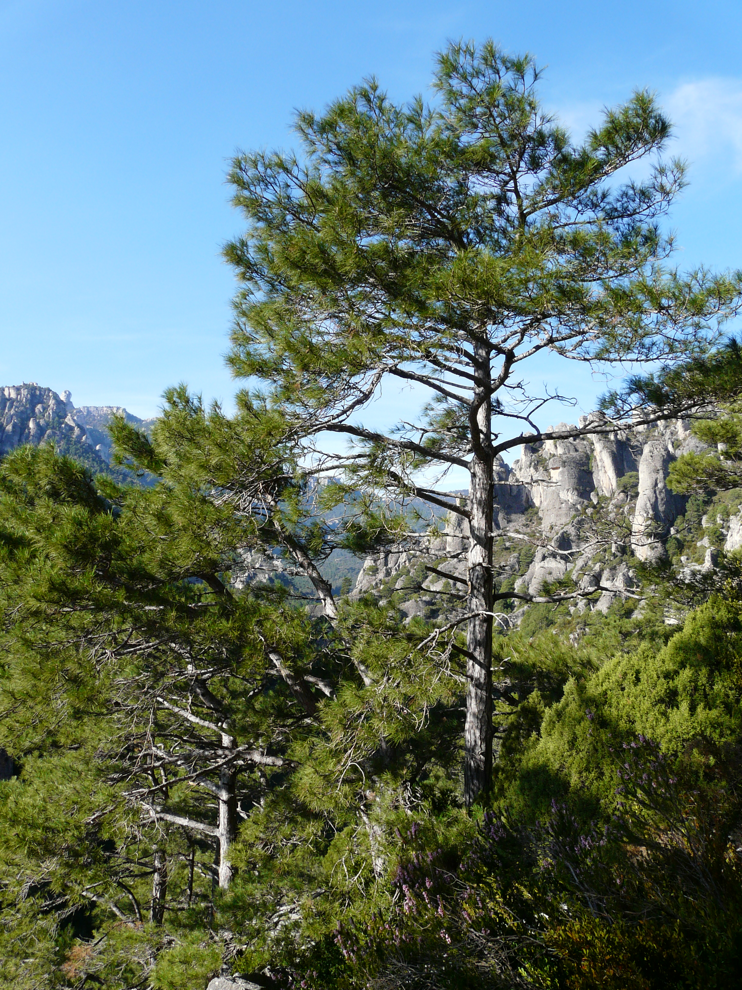 Els Ports (Baix Ebre, Montsià, Terra Alta) (La Sénia, Roquetes, Alfara de Carles i altres). This is a a photo of a natural area in Catalonia, Spain, with id: ES510154 Object location40° 48′ 36″ N, 0° 19′ 12″ E